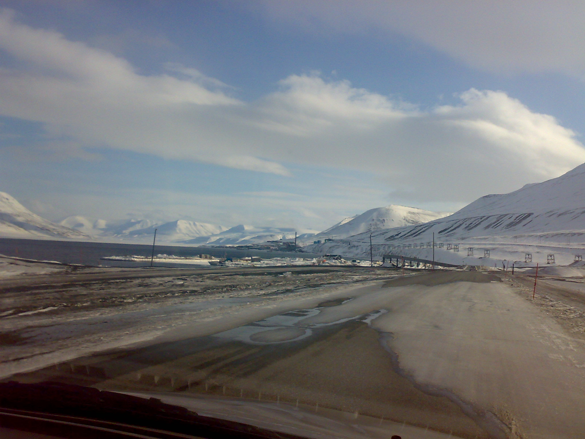 Longyearbyen Svalbard